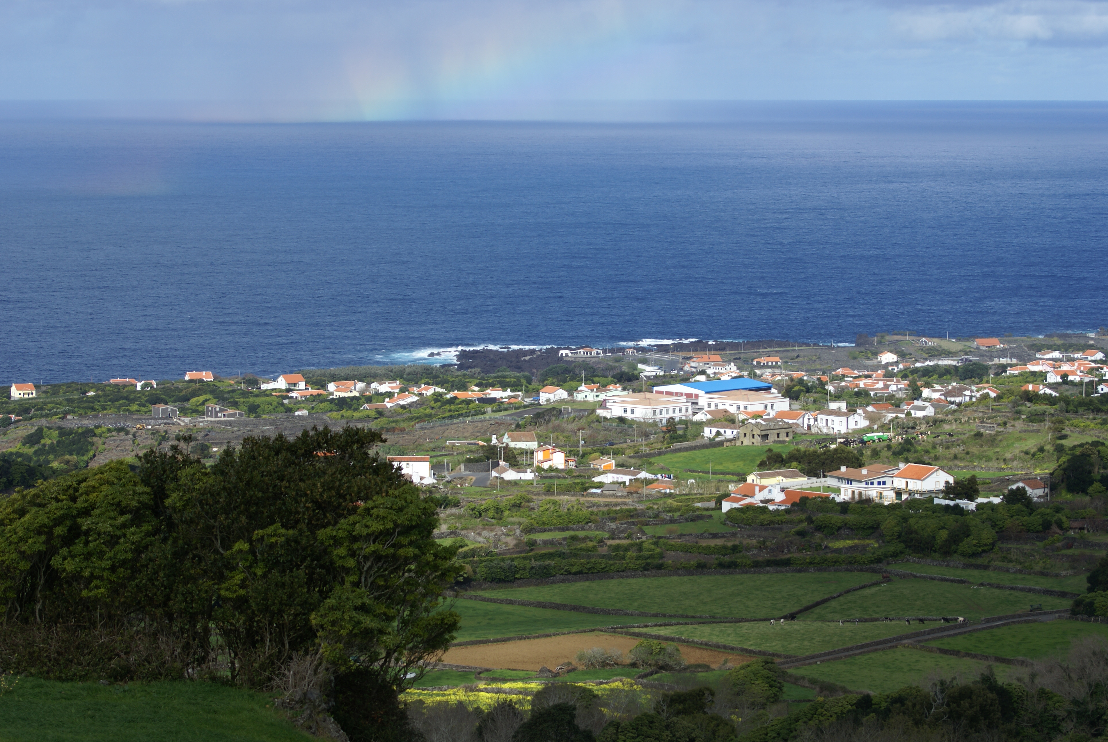 Biscoitos, vista parcial, Praia da Vitória, ilha Terceira, Açores